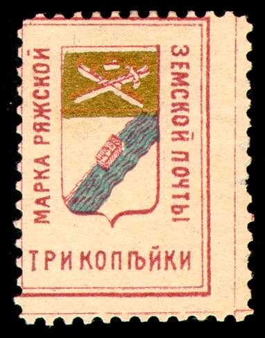 Земская марка. Ряжский уезд № 4 (1898 г.)